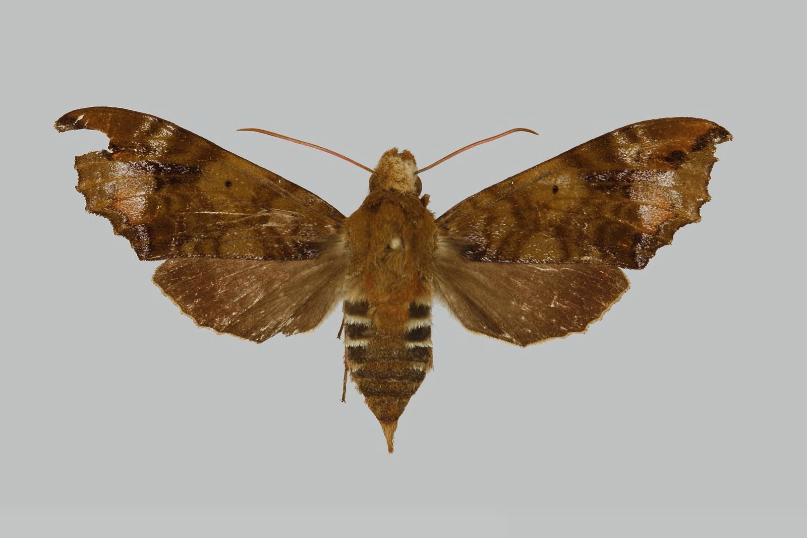 Protaleuron rhodogaster, female, upperside. Bolivia, Dept La Paz Caranavi Ã Yucumo, Km 39 env. 194km de La Paz